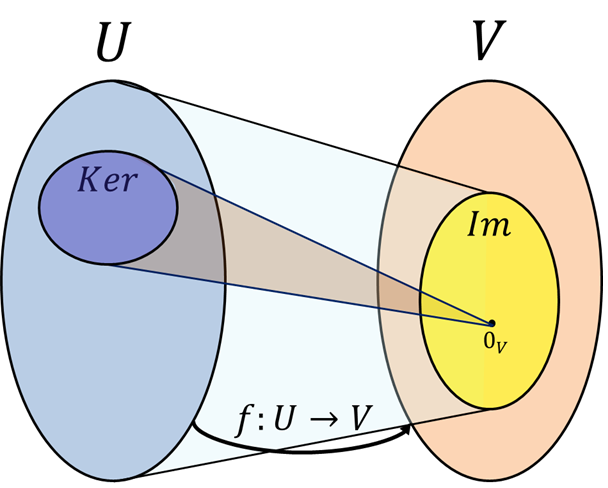 סקיצת העתקה לינארית בין מרחבים וקטוריים, עם תיאור התמונה והגרעין